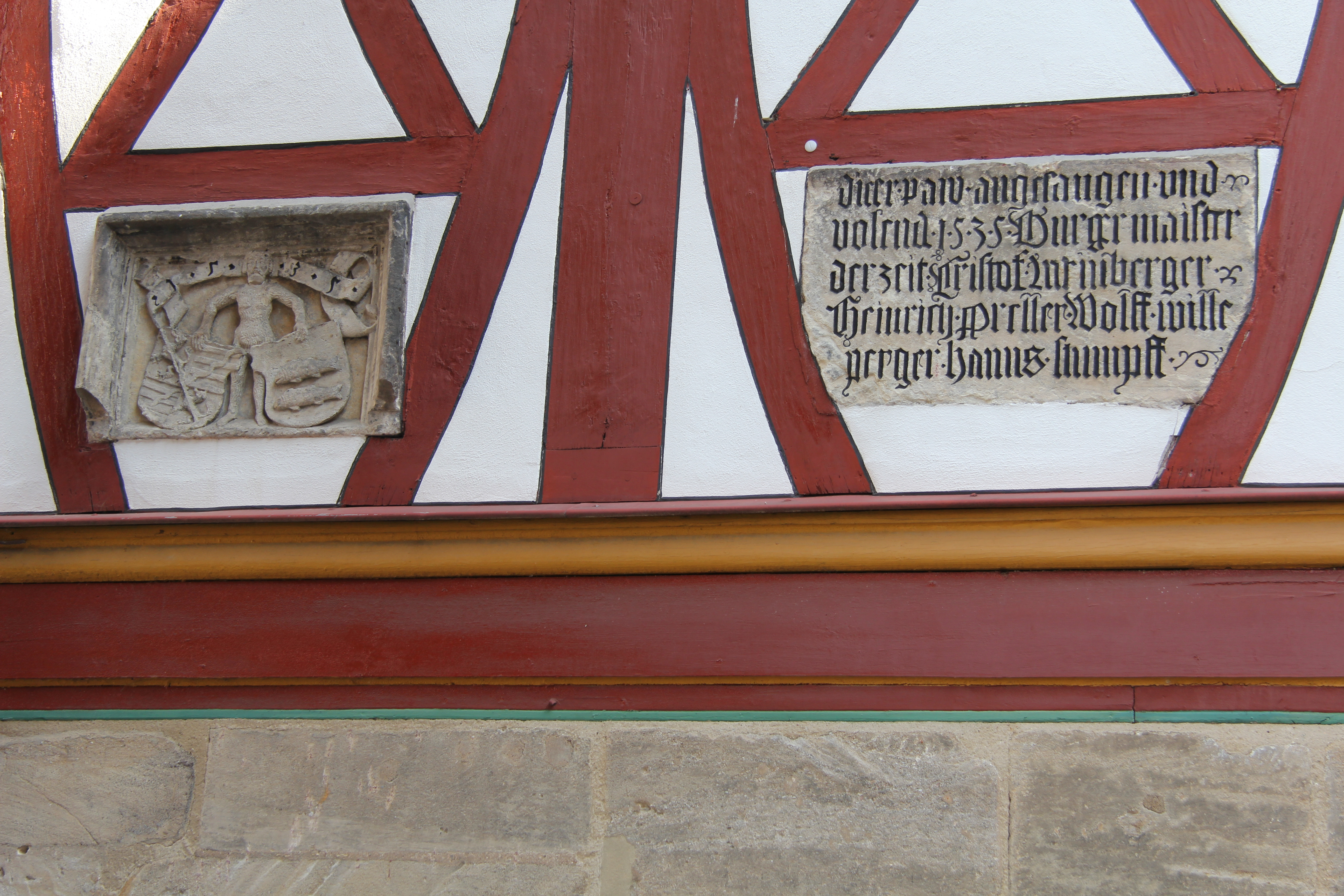 Forchheim Rathaus Magistratsbau WappensteinThis is a photograph of an architectural monument.